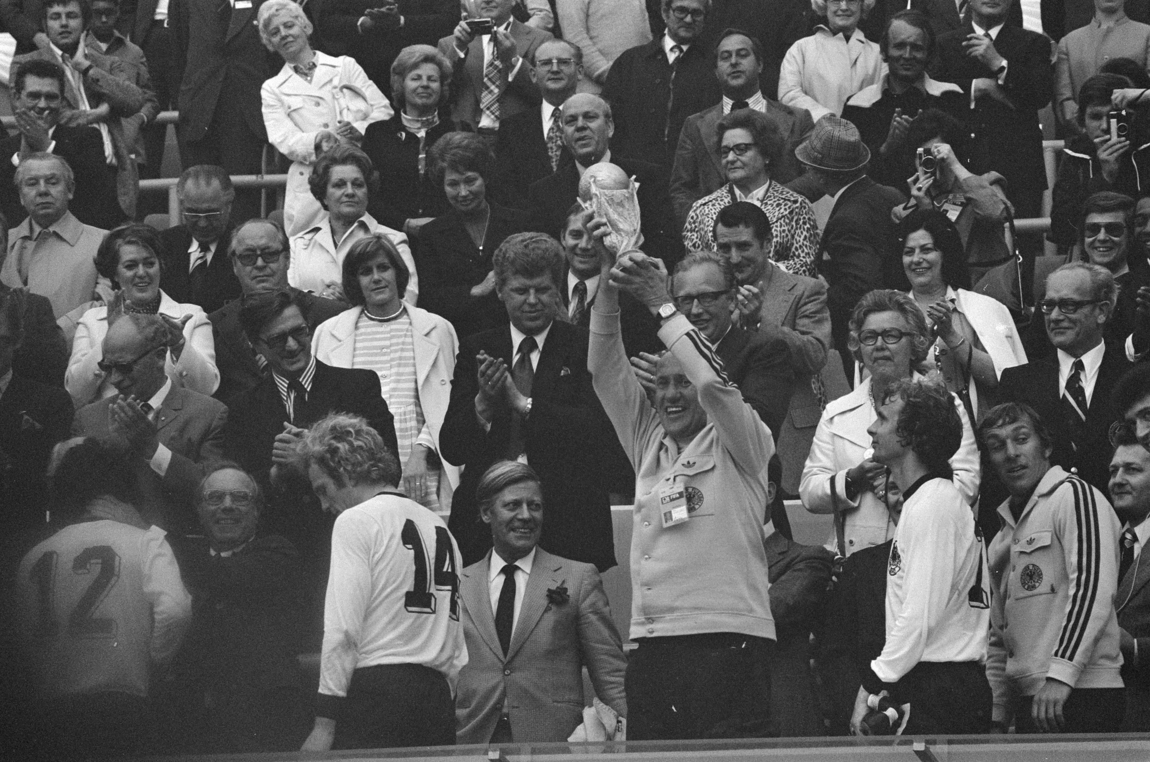 Collectie / Archief : Fotocollectie Anefo Reportage / Serie : [ onbekend ] Beschrijving : Finale wereldkampioenschap voetbal 1974 in Munchen, West Duitsland tegen Nederland 2-1; Duitse spelers met de wereldbeker Datum : 7 juli 1974 Locatie : München, Nederland, West-Duitsland Trefwoorden : finales, sport, voetbal, wereldkampioenschappen Fotograaf : Verhoeff, Bert / Anefo Auteursrechthebbende : Nationaal Archief Materiaalsoort : Negatief (zwart/wit) Nummer archiefinventaris : bekijk toegang 2.24.01.05 Bestanddeelnummer : 927-3100